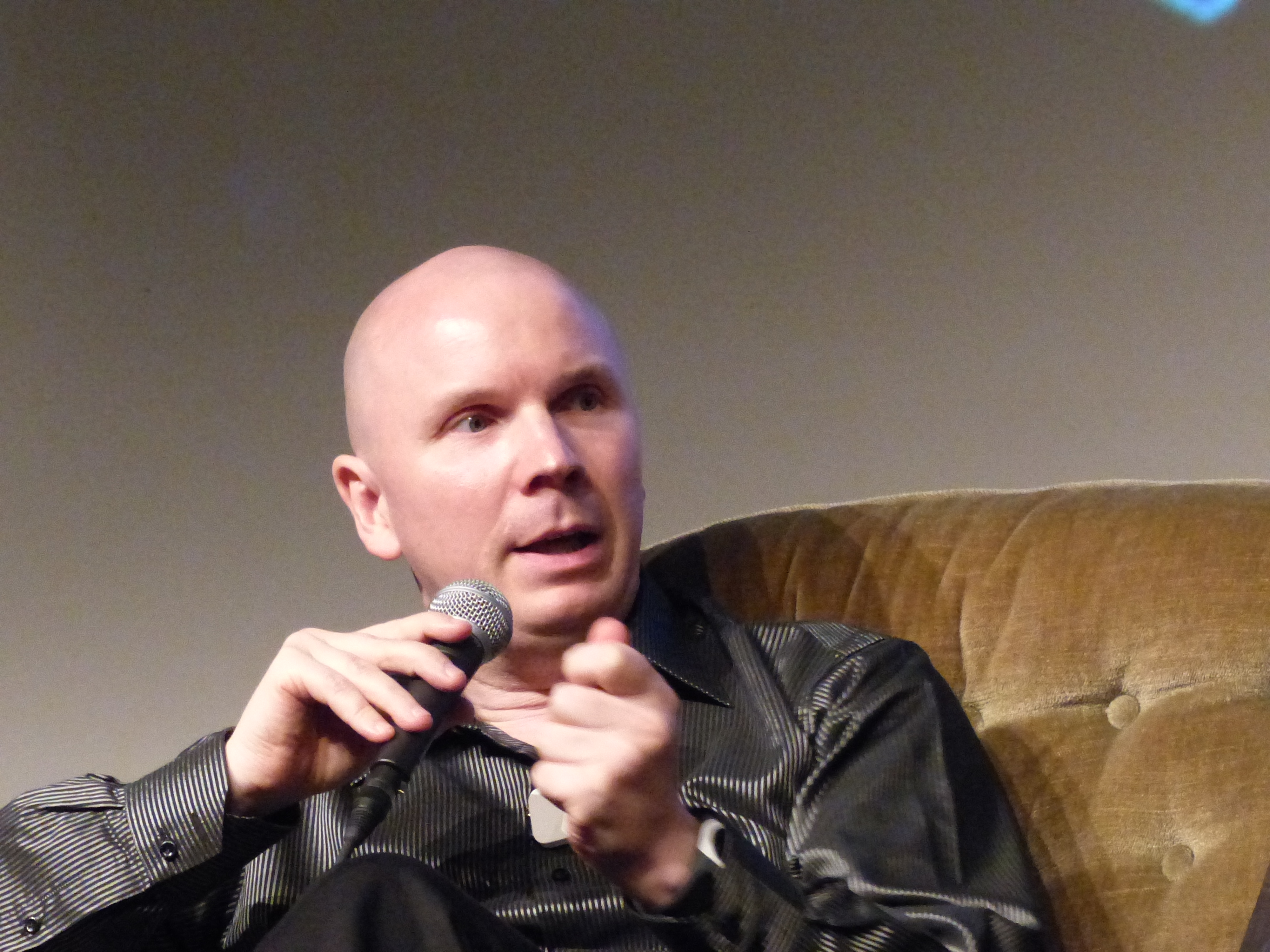 Philippe van Nedervelde op Het Denkgelag